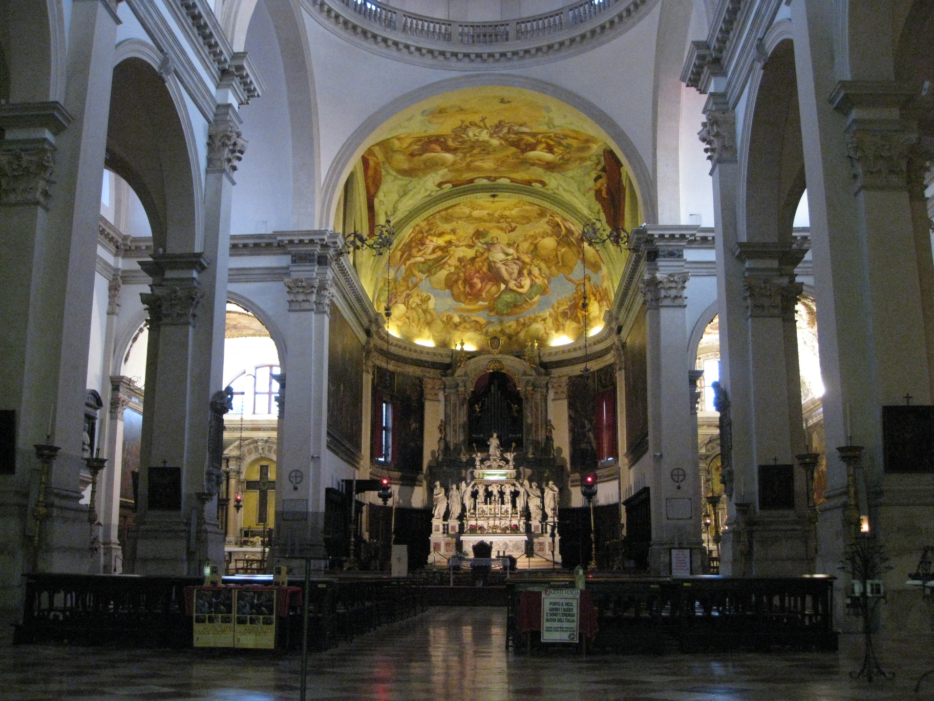 Chiesa di San Pietro di Castello a Venezia - Interno